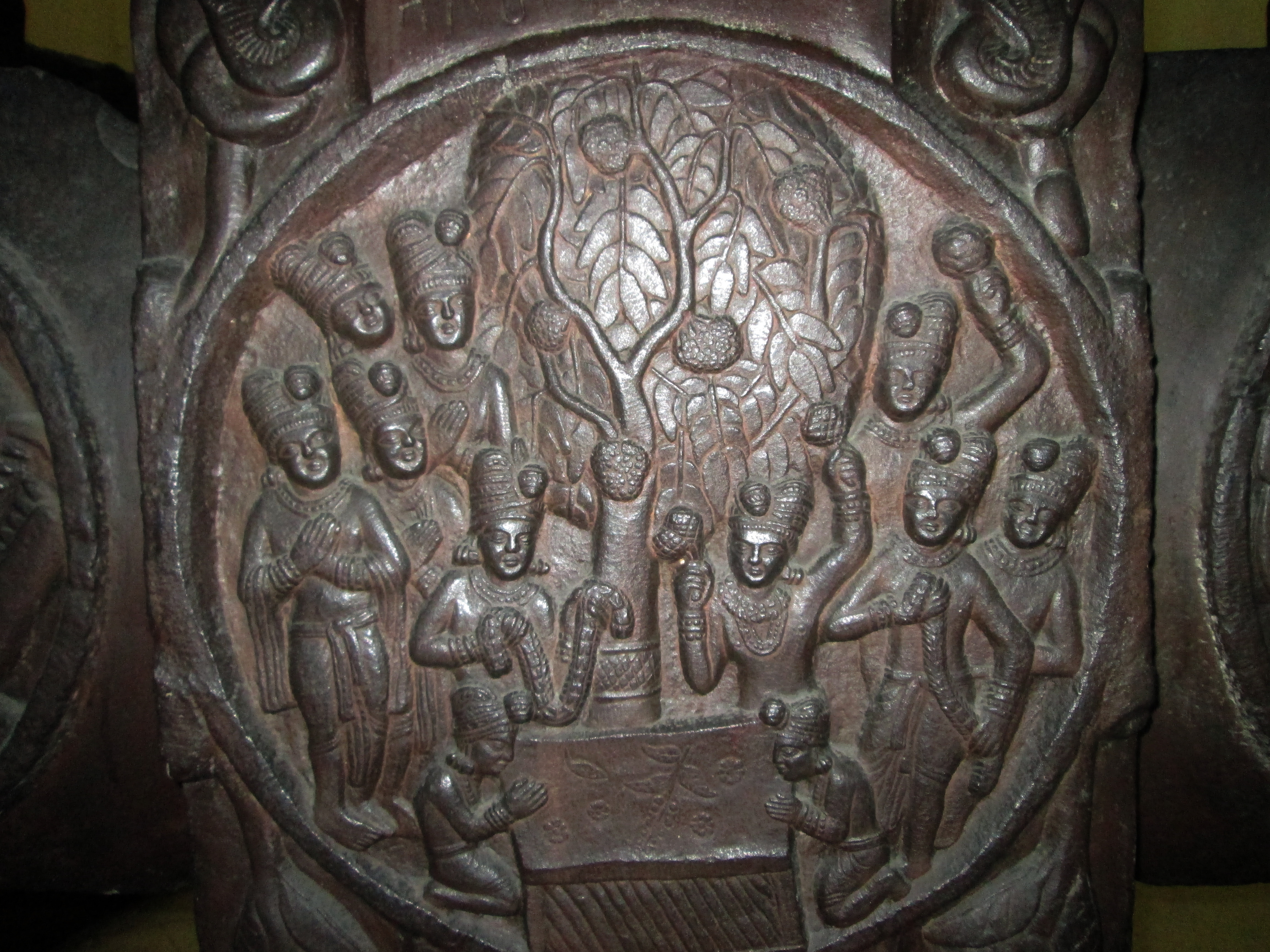 23 Vipassi and Patali Tree, Bharhut Stupa at the Indian Museum, Kolkata Photograph from the Indian Museum in West Bengal taken by Anandajoti.